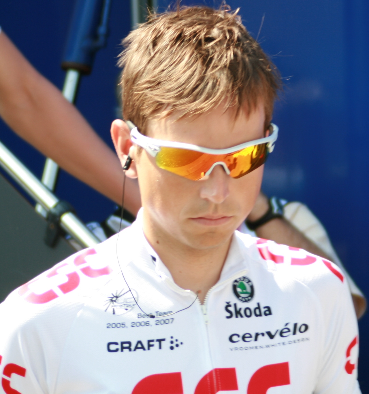 Jurgen Van Goolen aux Quatre jours de Dunkerque 2008